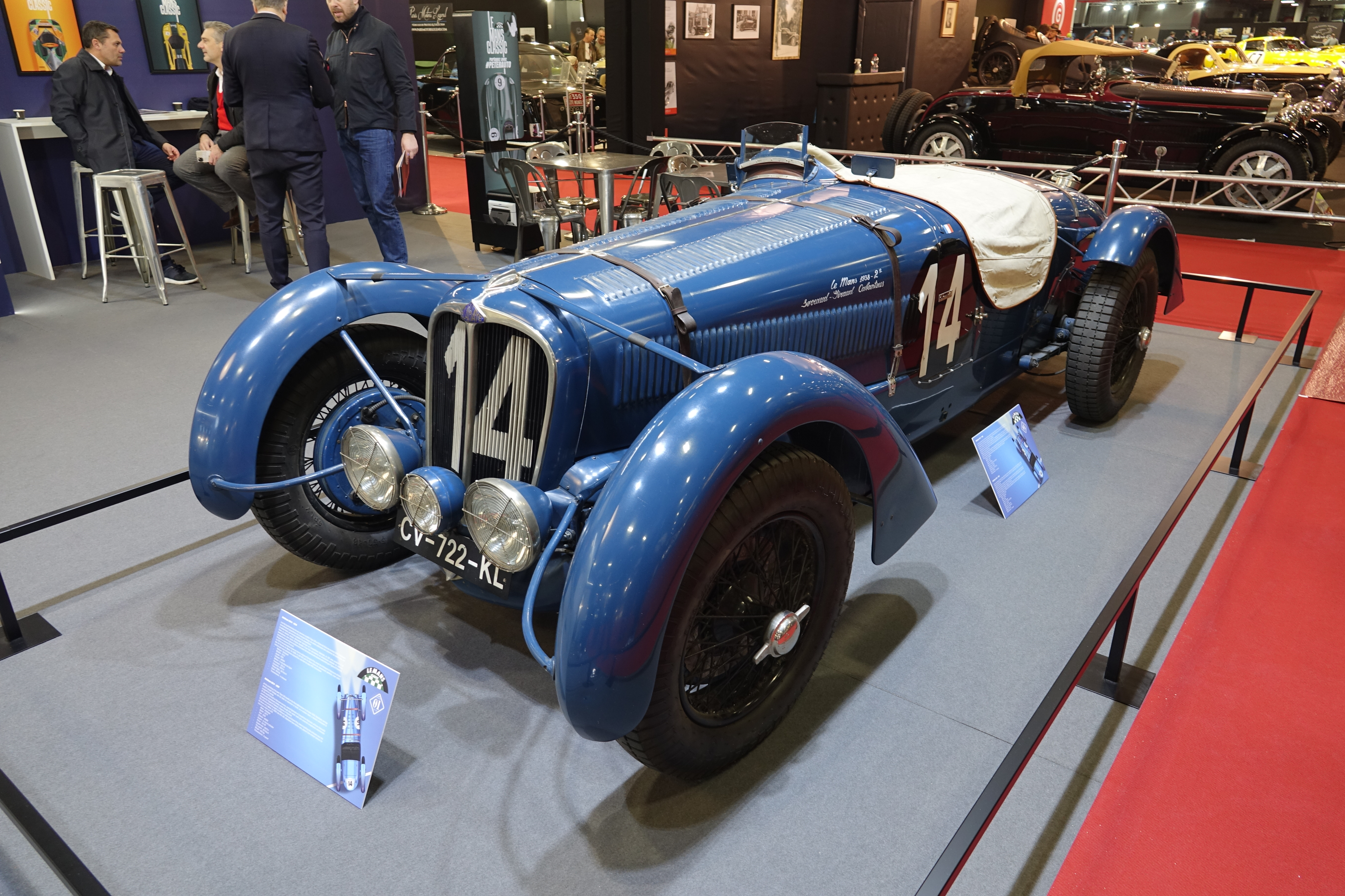 Delahaye 135S - Peter Auto au salon Rétromobile 2020